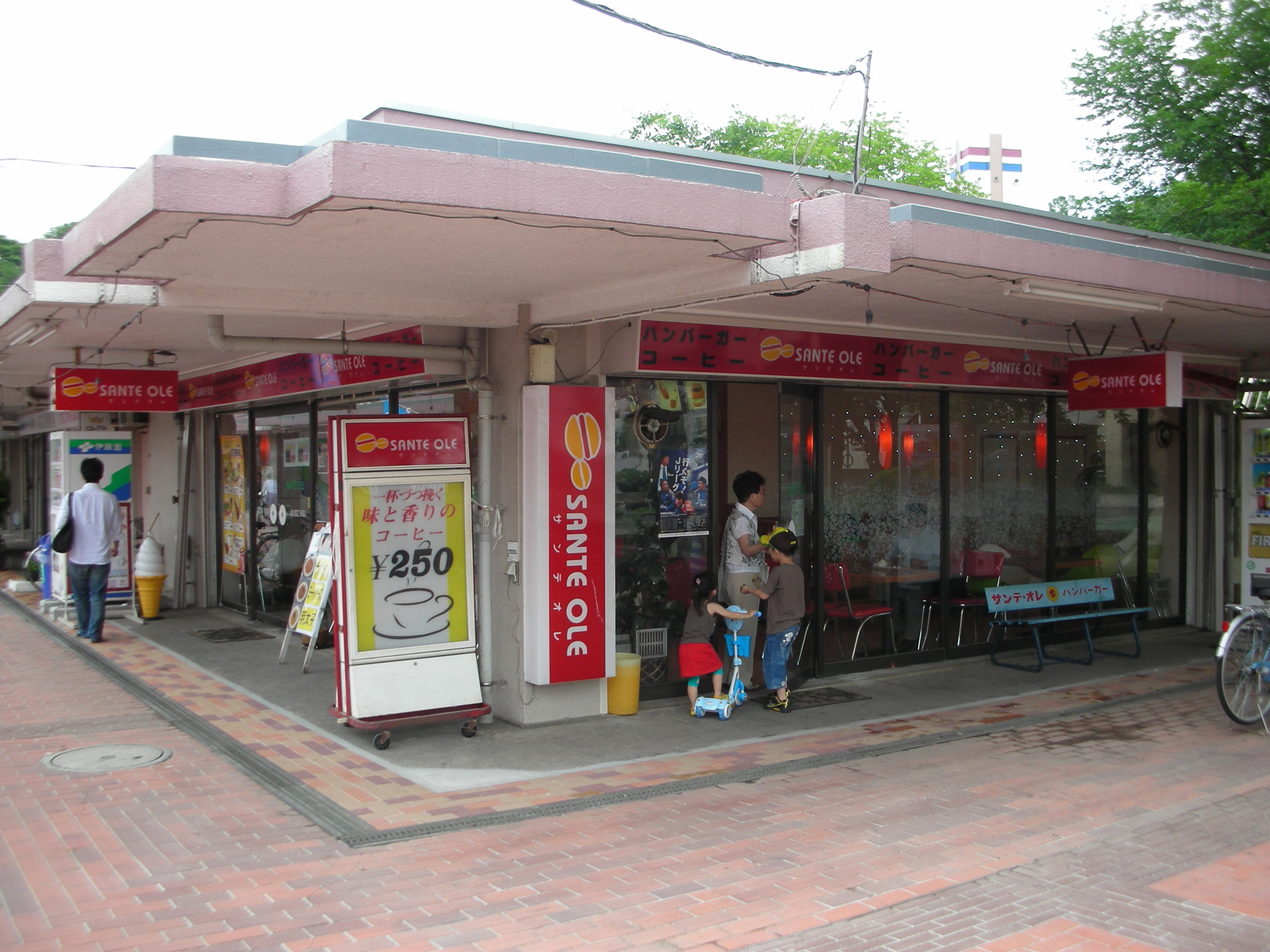 サンテオレ町田山崎店の外観